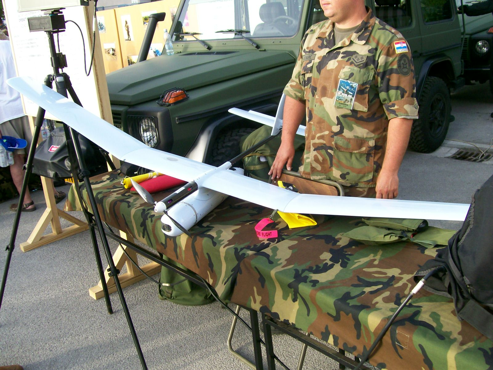 Bespilotna letjelica "Skylark"